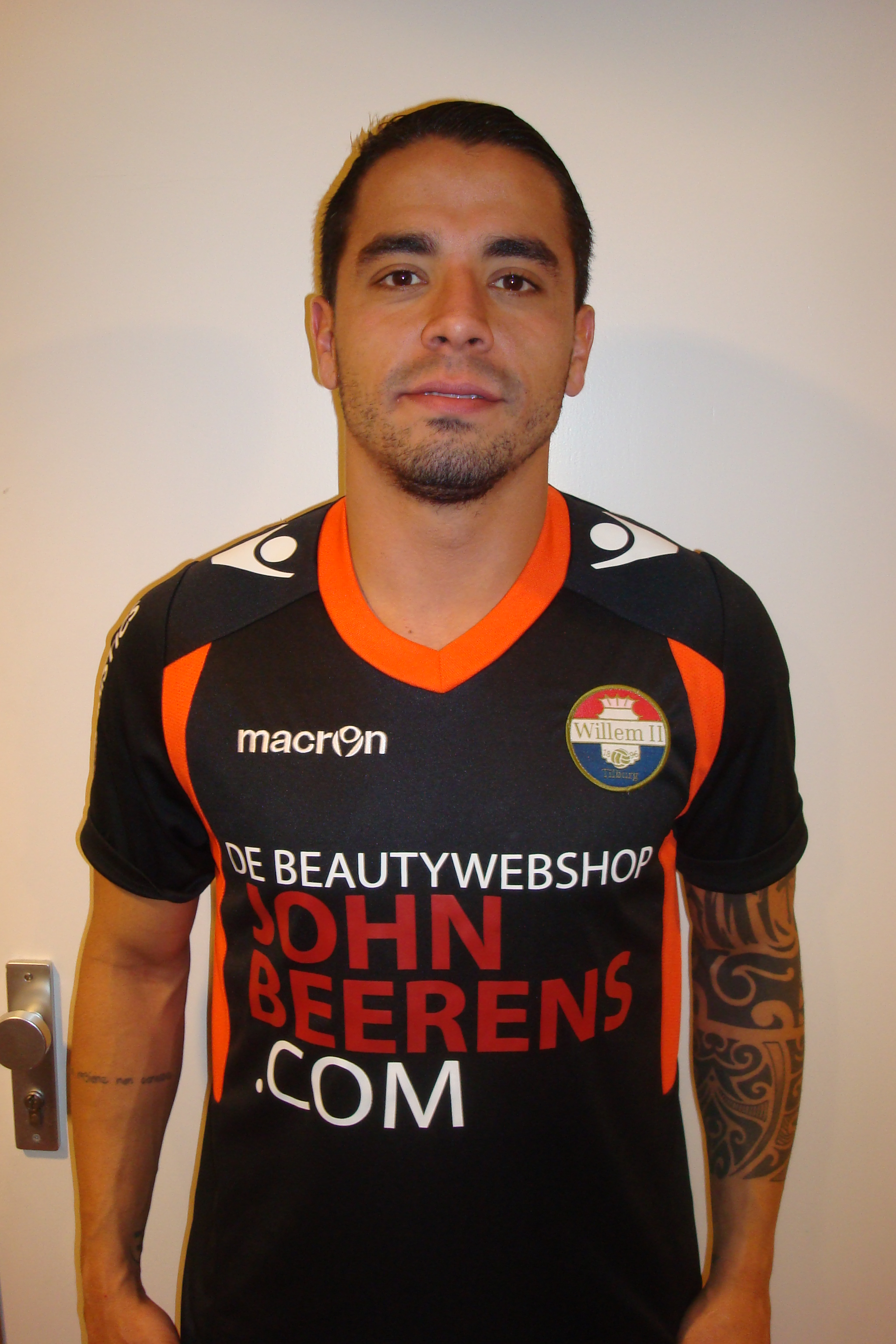 Bruno Andrade in het shirt van Willem II seizoen 2013/2014